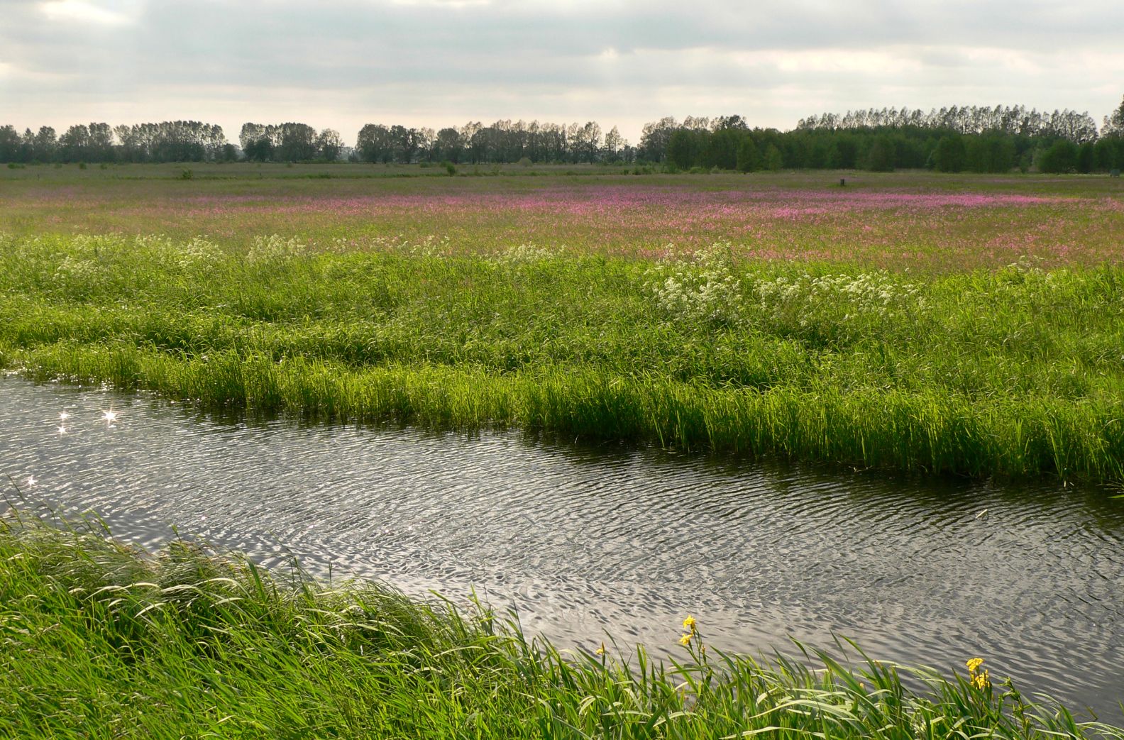 Feuchtwiesen und Entwässerungsgraben im Naturschutzgebiet Nördlicher Drömling innerhalb des Naturschutzgebietes Ohre-Drömling, Sachsen-Anhalt